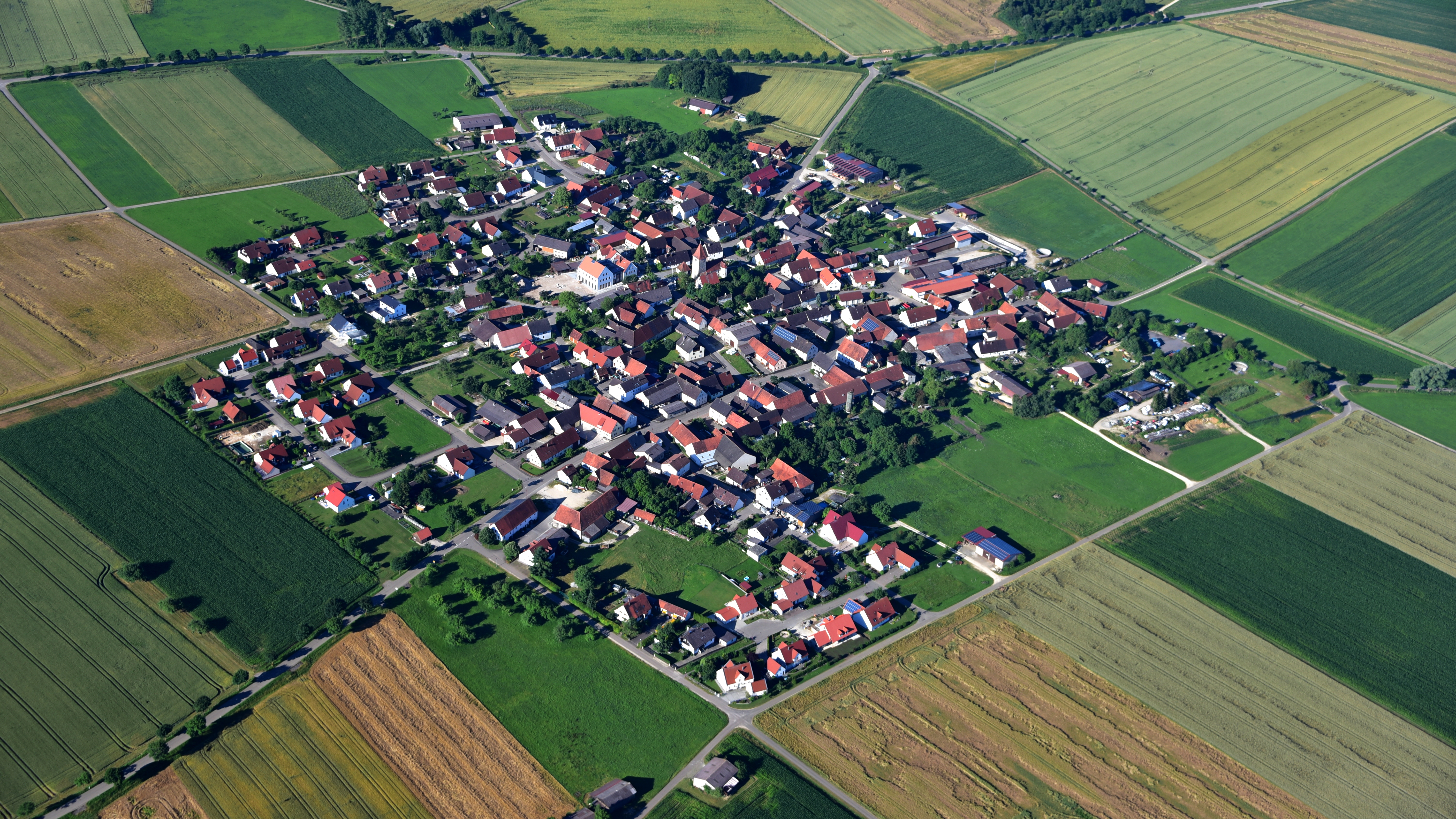 Forheim, Luftaufnahme (2016)